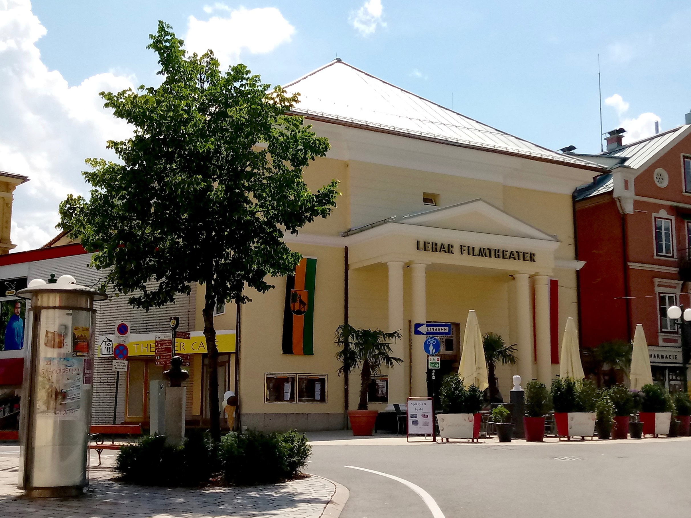 Lehar-Theater